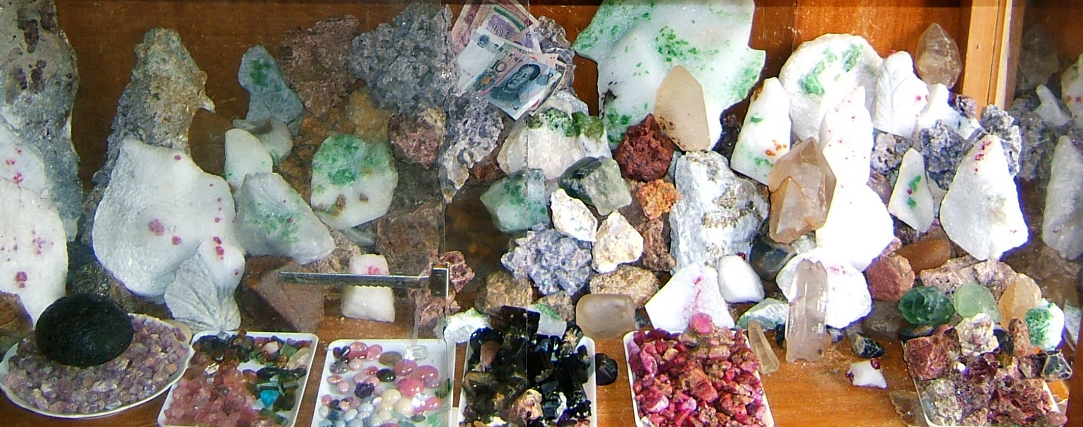 A gemstone market stall in Luc Yen District, Yen Bai Province, Vietnam